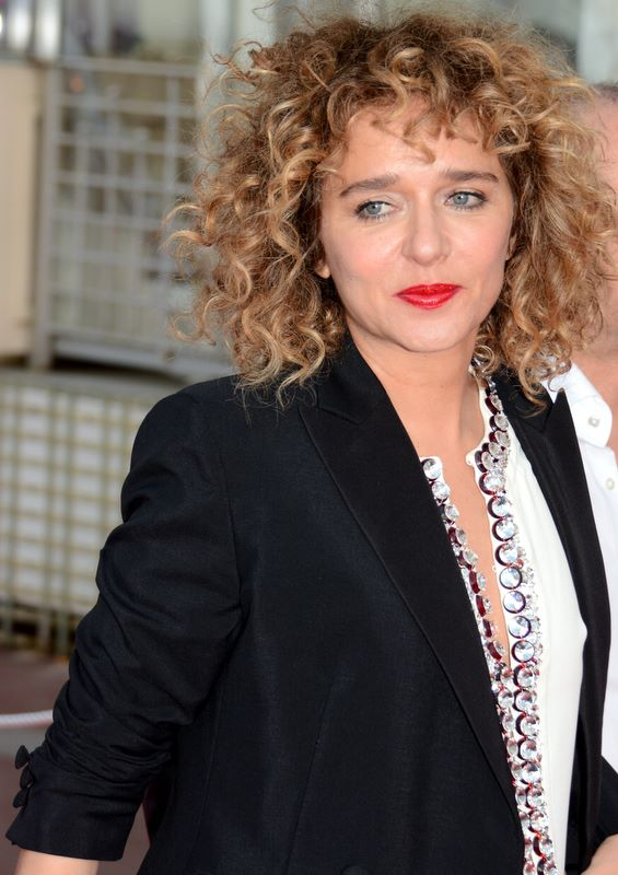 Valeria Golino au festival du film de Cabourg